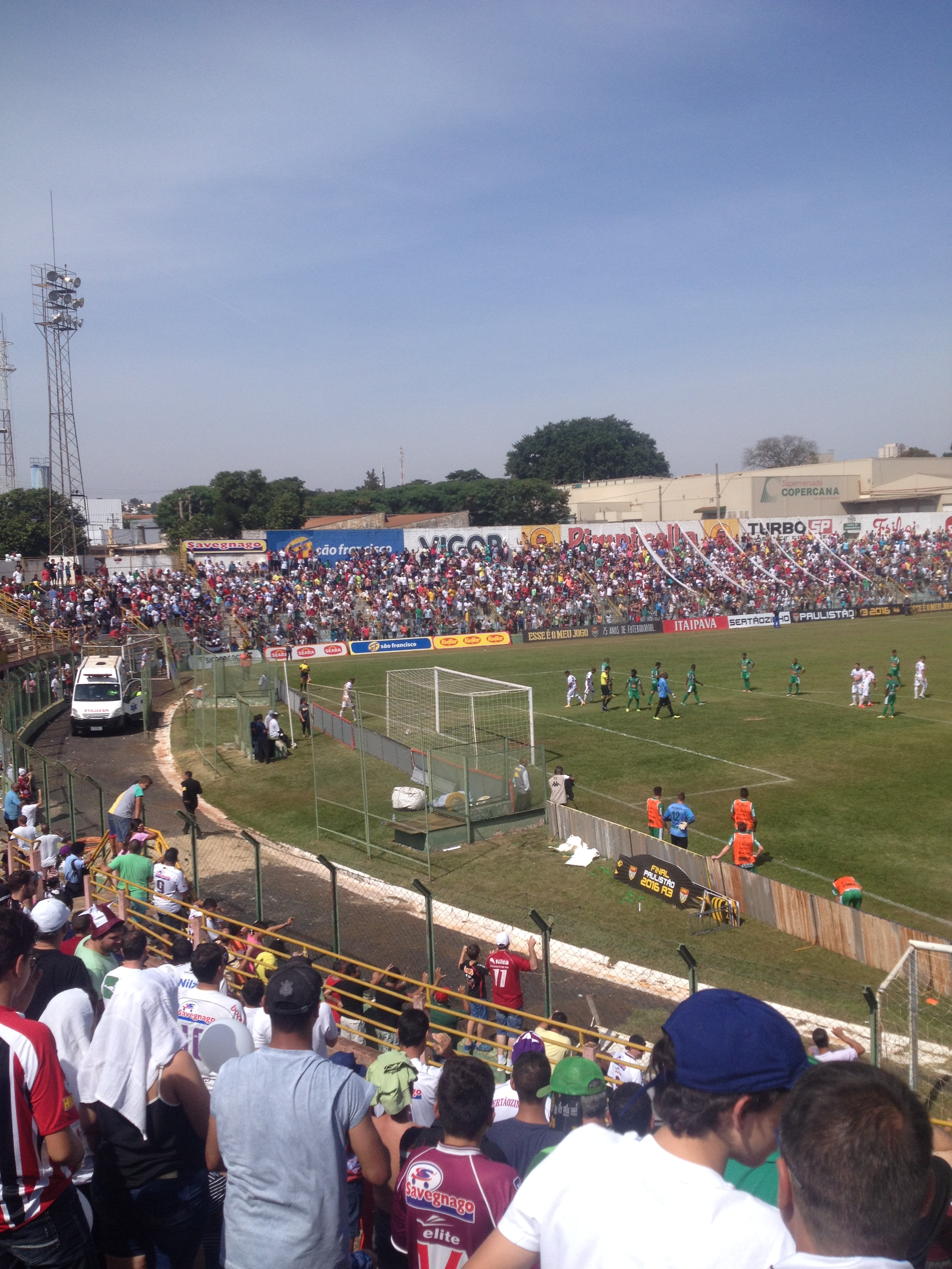 Estádio Frederico Dalmaso (Fredericão) Em Uma Partida do Sertãozinho, Campeonato Da Serie A3 (2016)